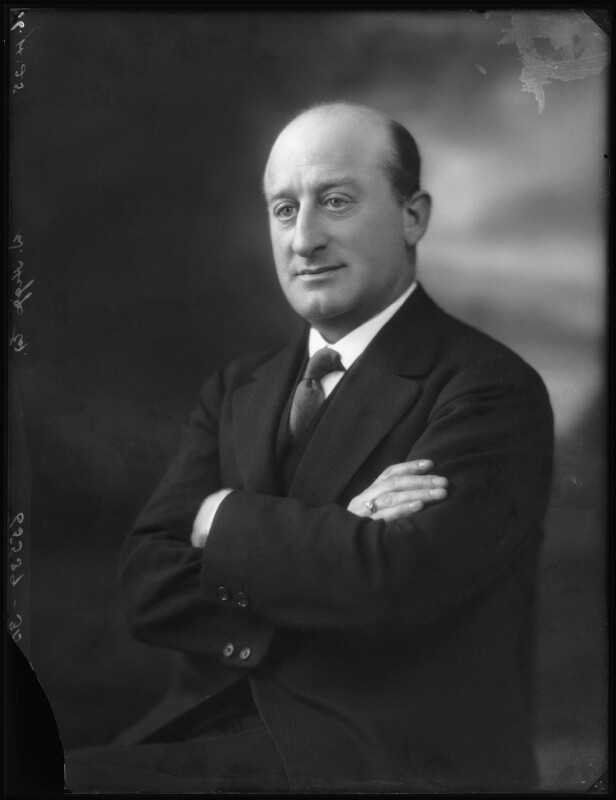 Portrait of Walter Frank Higgs